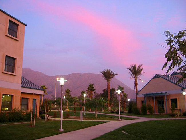 Sunset over UCR Residence Halls